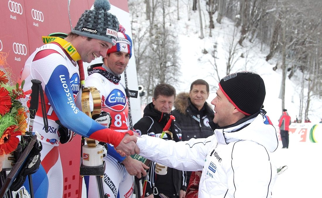 Президент Медведев награждает победителя в скоростном спуске этапа Кубка мира по горным лыжам швейцарского спортсмена Беата Фойца в Сочи на горнолыжном комплексе Роза Хутор. 11 февраля 2012